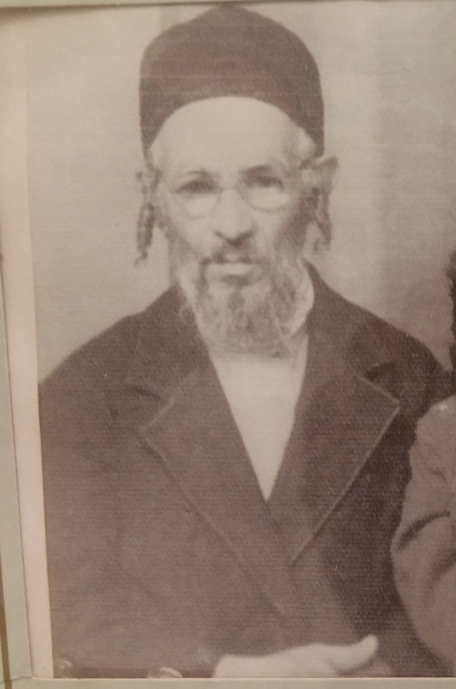 צלום בלתי מתוארך